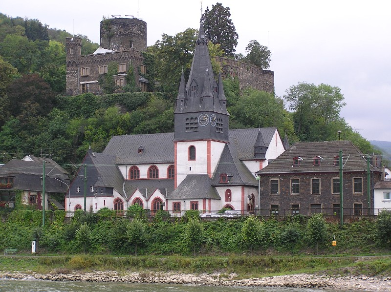 Niederheimbach - Kirche und Heimburg